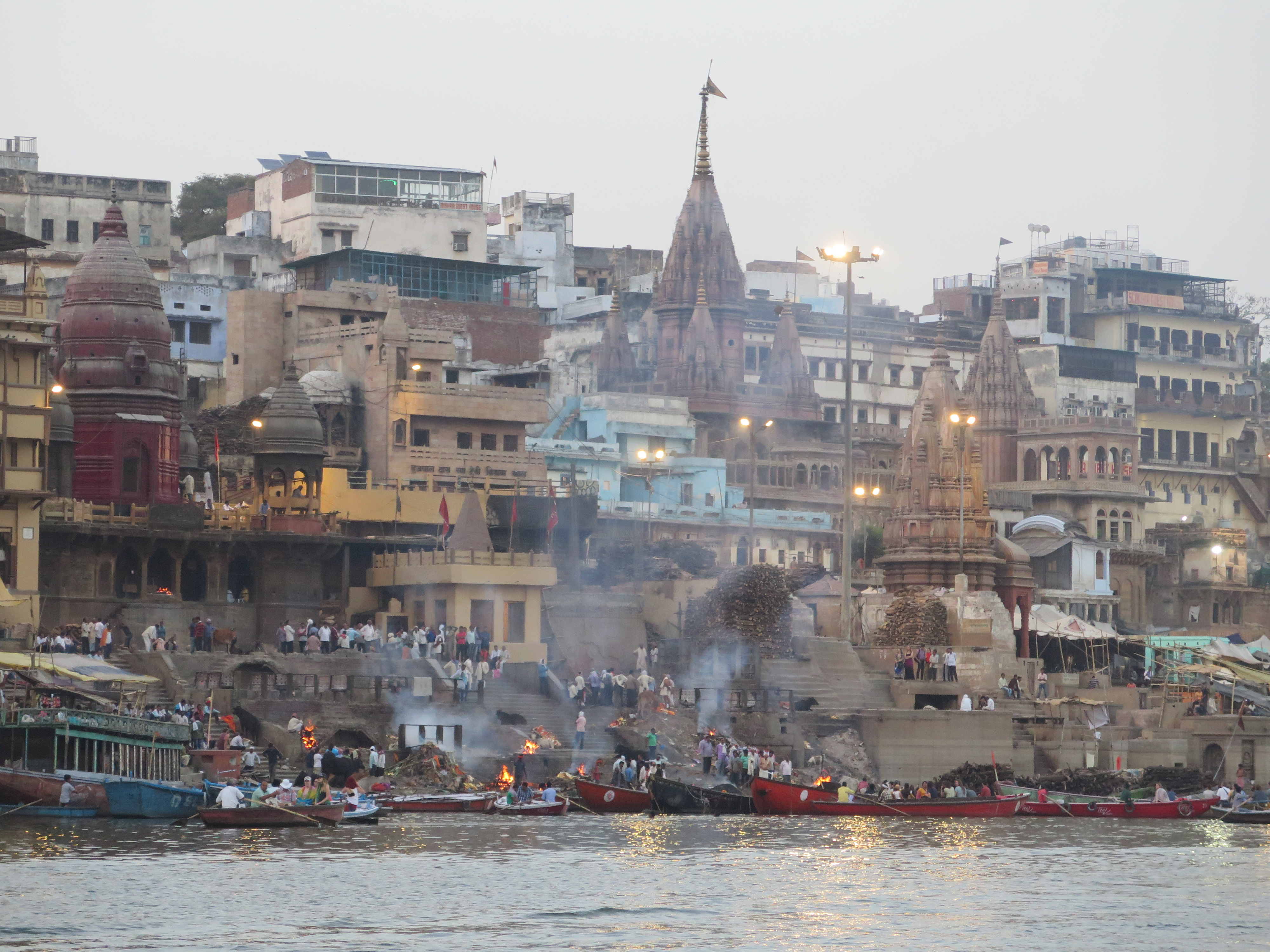 Inde voyage